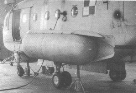 Mi-14PŁ na podnośnikach. Pływaki boczne wypuszczone, luk bombowy otwarty. Nad drzwiami wejściowymi widać wciągarkę ŁPG-150. (opis orginalny)